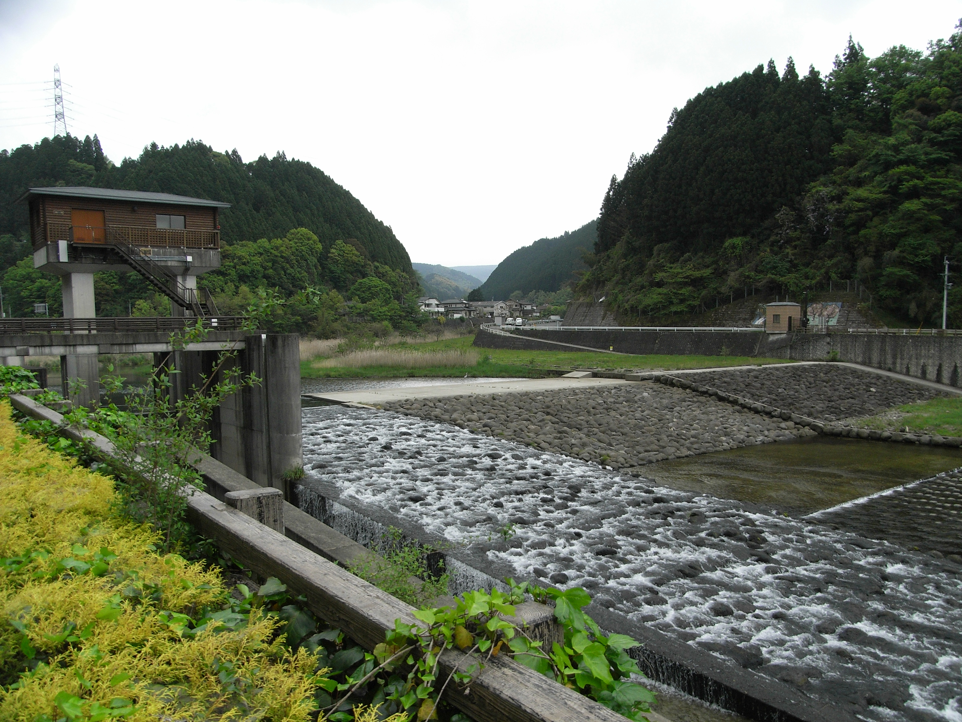 Dam